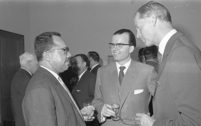 Essen für den irakischen Informationsminister General Abdul Karim Farhan mit StS. von Hase im Hotel Königshof, Bonn